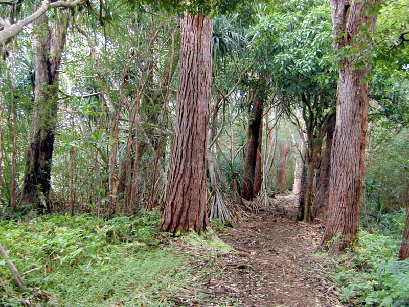 Das Koolau Forest Reservat, das Regenwaldgebiet auf der Insel Maui (Hawaii) das einen Besuch wert ist.